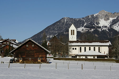 Kirche von Lenk